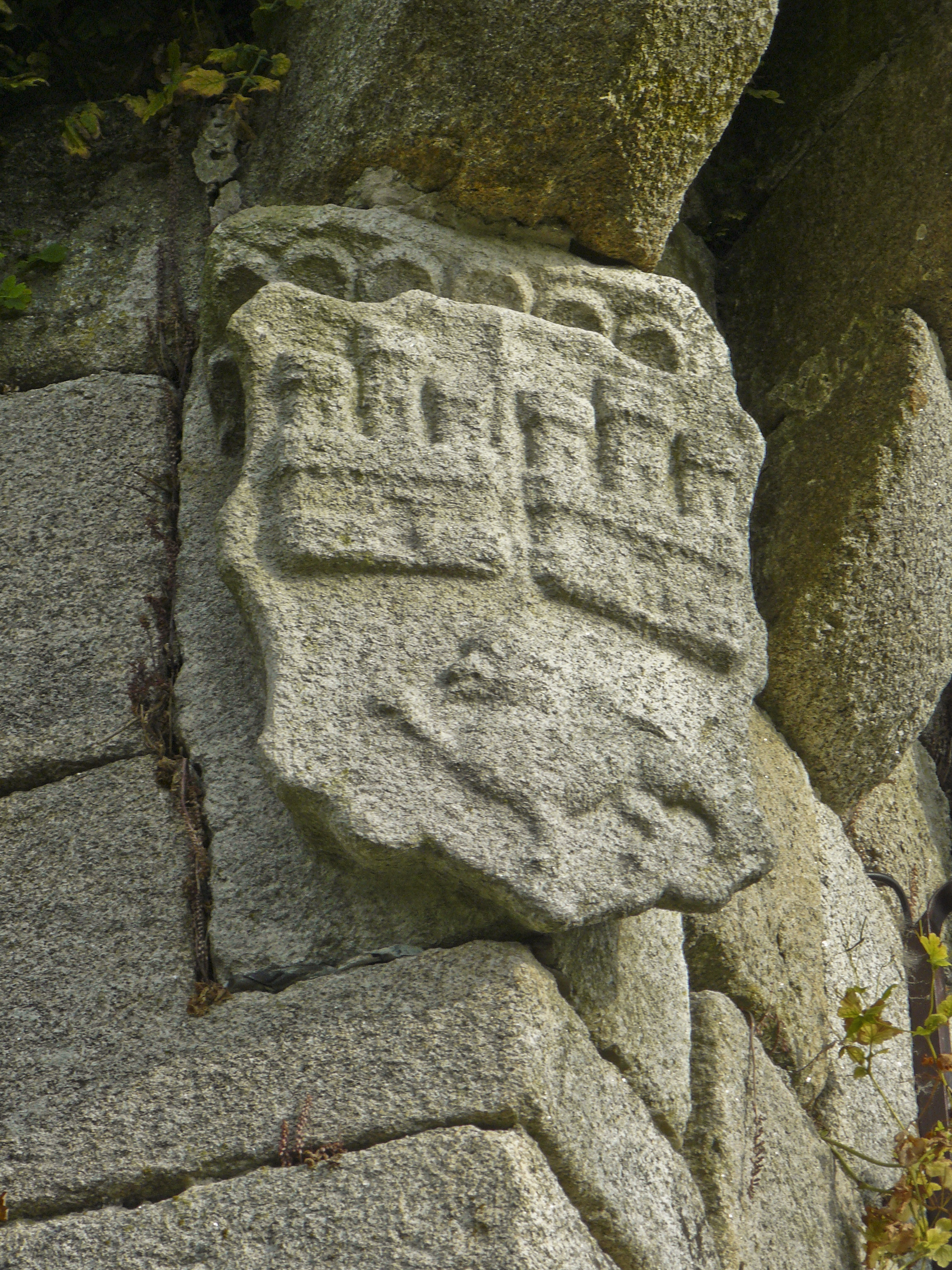 Escudo do Castelo de Maceda